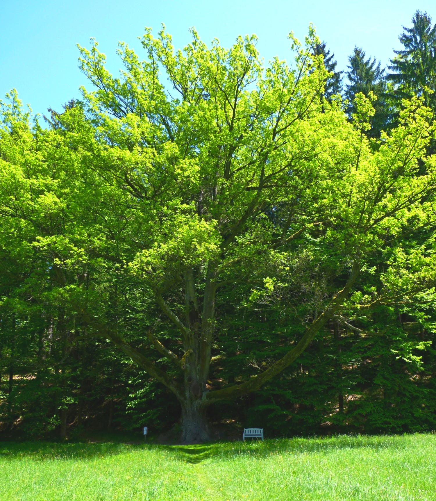 Strom svatebčanů (také označovaný jako Dub v Údolí 2) je památný strom, který roste na území národní přírodní památky Terčina údolí u Nových Hradů. Stojí na kraji lesního porostu při červené turistické trase (a naučné stezce Terčino údolí) asi 25 metrů od potoka.